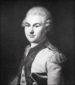 Donatien-Marie-Joseph de Rochambeau (1755-1813) en uniforme du régiment d'Auvergne